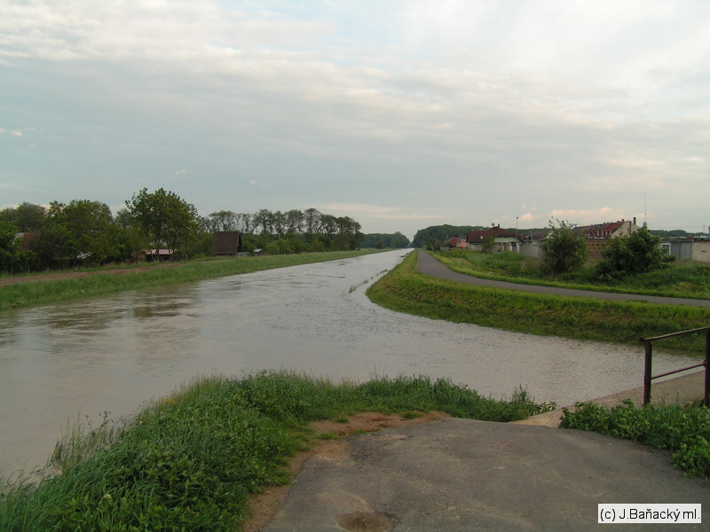 Sútok Drehňovca a Trnavky počas povodní v máji 2005